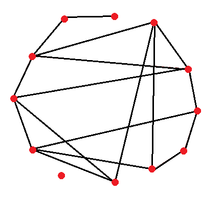 случайный граф